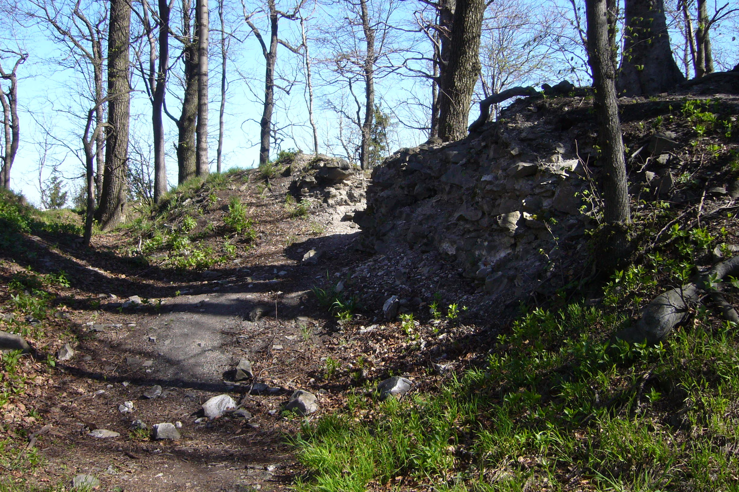 Falkenburk – vstup cesty do hradního jádra